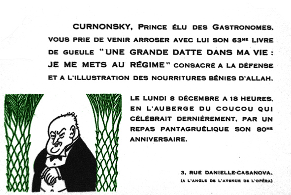 archives Curnonsky - editions Curnonska, T2 2007